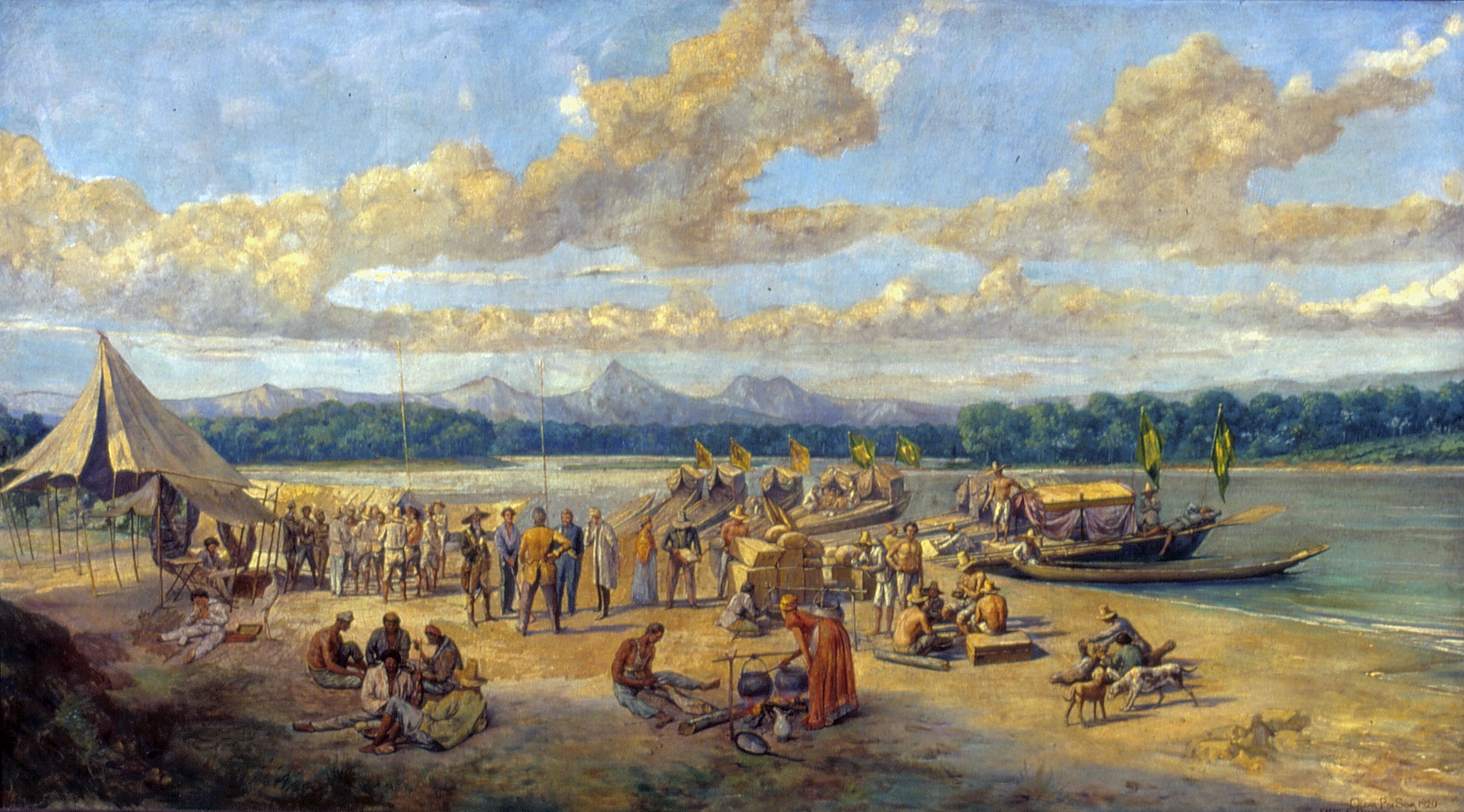 Obra que integra o acervo do Museu Paulista da USP. Coleção Fundo Museu Paulista - FMP